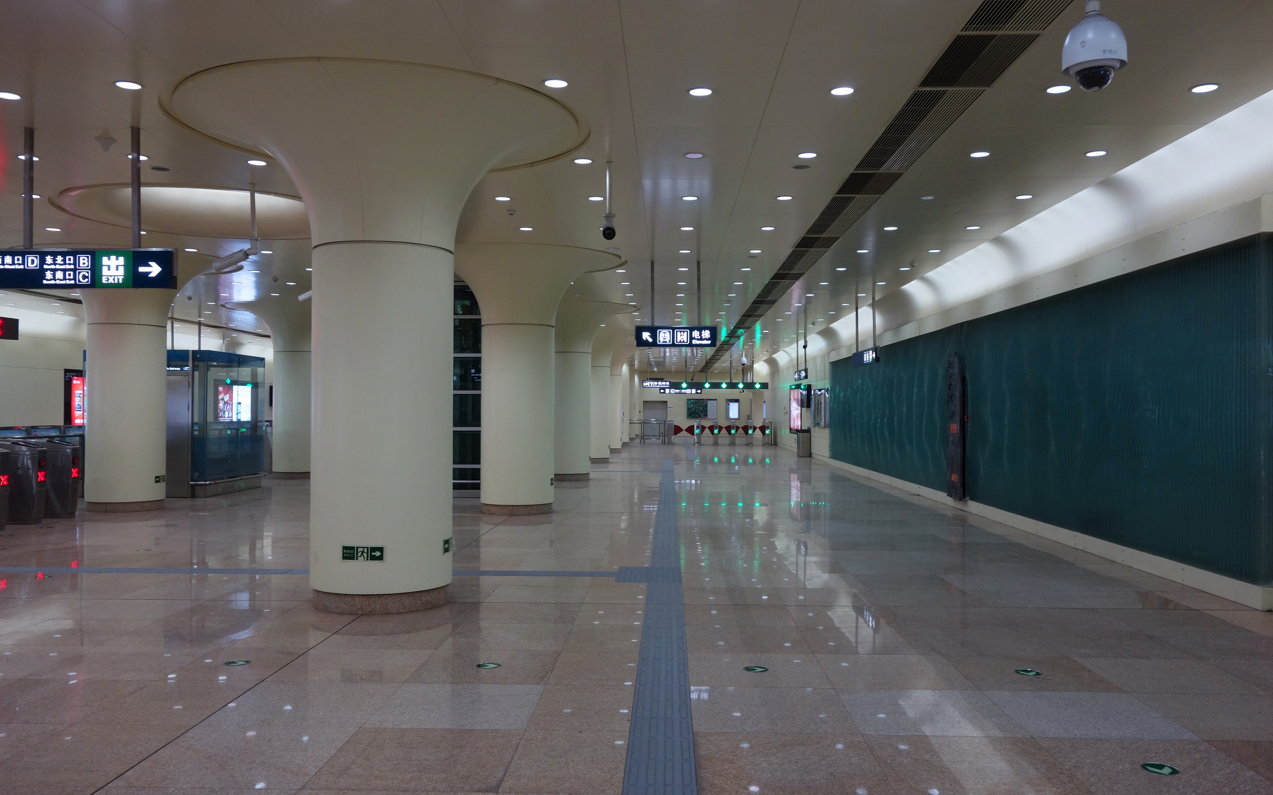 北京地铁10号线莲花桥站的站厅